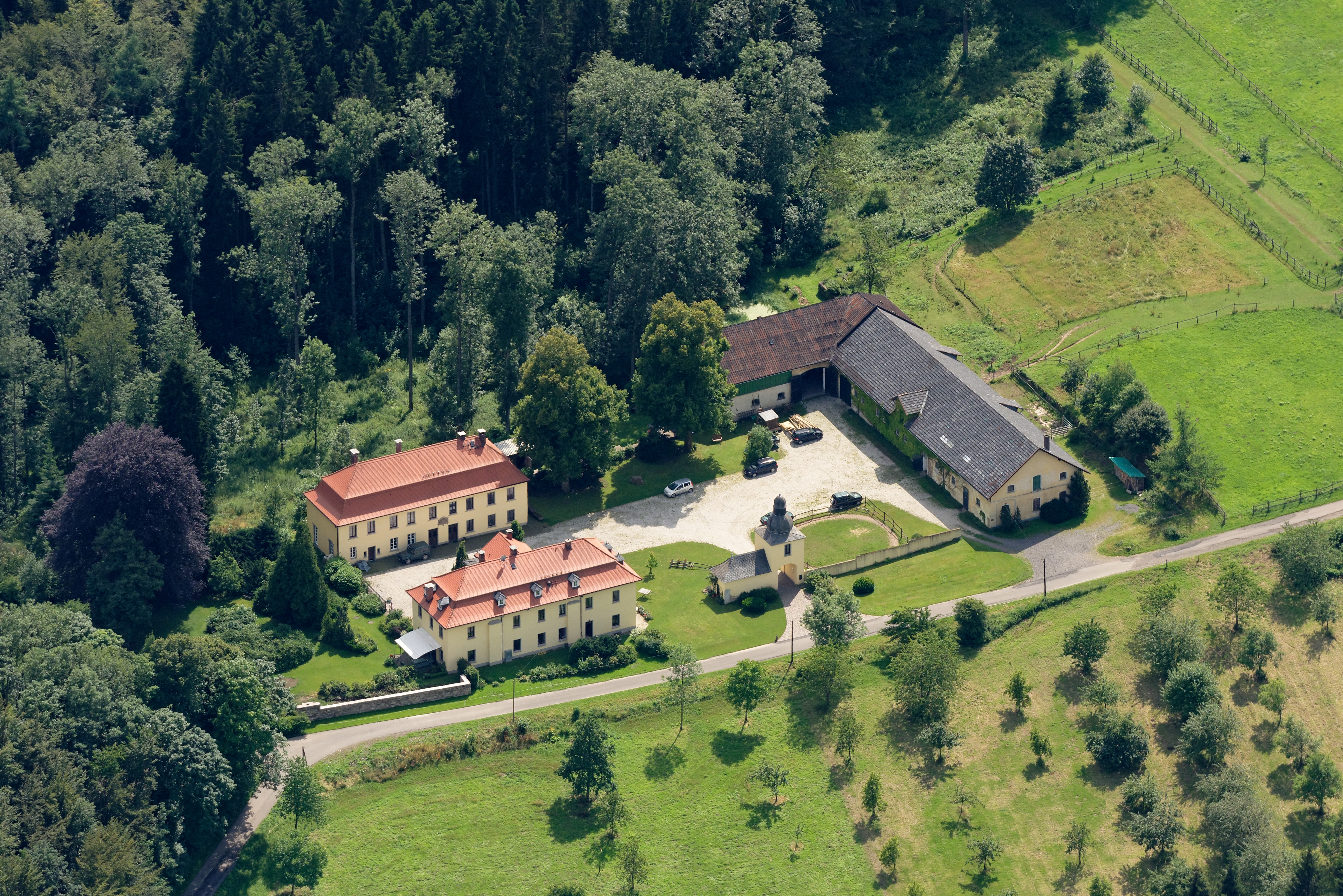 Luftaufnahme: Gut Listringhausen in Meinerzhagen